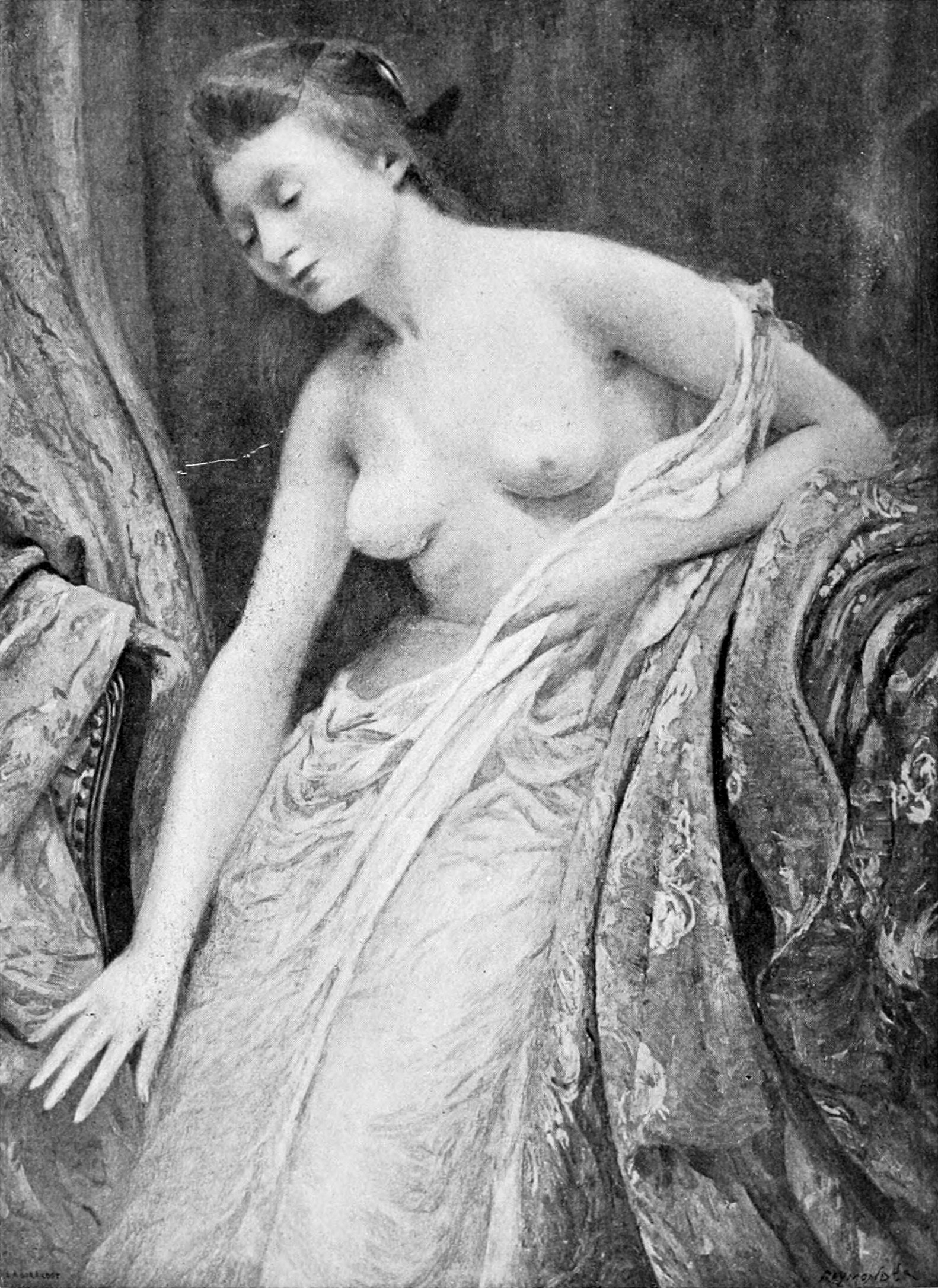 Fantaisie